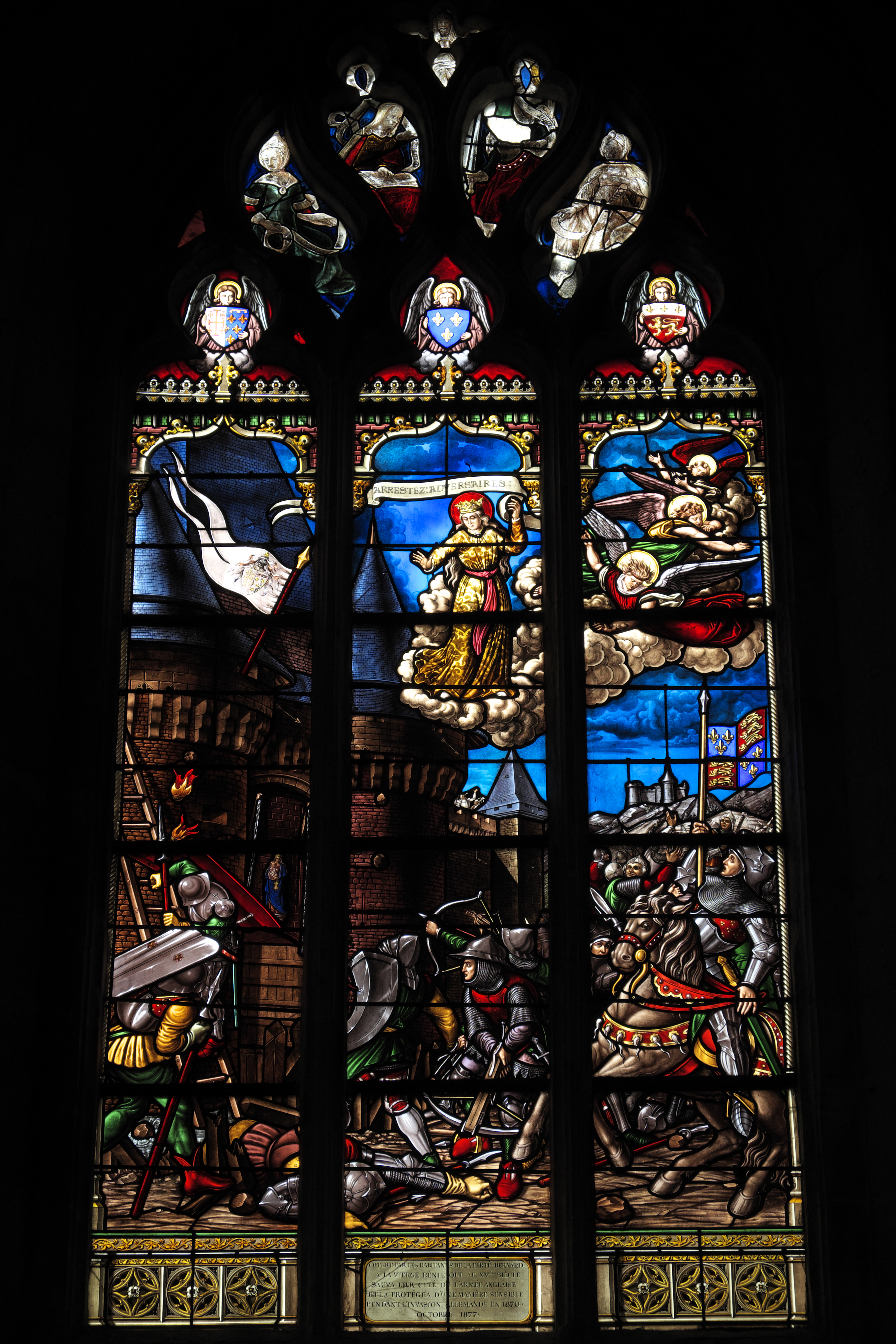 Katholische Pfarrkirche Notre-Dame-des-Marais in La Ferté-Bernard im Département Sarthe (Pays de la Loire/Frankreich), Bleiglasfenster mit Scheiben im Maßwerk aus der zweiten Hälfte des 15. Jahrhunderts, Lanzetten von 1877, von Eugène Hucher, aus der Glasmalereiwerkstatt der Karmeliten von Le Mans (Carmel du Mans); Darstellung: Angriff der Engländer auf La Ferté-Bernard während des Hundertjährigen Krieges